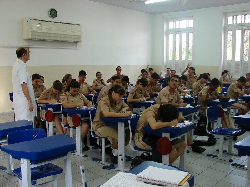 Professor ministrando aula no CMRJ.